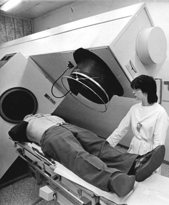 Jena, Sowjetischer Linearbeschleuniger ADN-ZB Kasper 11.2.85 Jena: Sowjetischer Linearbeschleuniger- Bereits seit mehreren Jahren bewährt sich an der Radiologischen Klinik der Friedrich-Schiller-Universität ein sowjetischer Linearbeschleuniger. Astrid Eberhardt, Fachassistentin für Strahlentherapie bereitet einen Patienten für die Bestrahlung mit ultrastarken Röntgenstrahlen vor. Die Jenaer Anlage - sie hat eine Leistung von 20 Megaelektronenvolt - ist eine von drei dieser Größenordnung, die gegenwärtig in der DDR zur Behandlung von Geschwulstkrankheiten eingesetzt werden. Erfahrungen, die die Jenaer Fachleute beim Einsatz des Linearbeschleunigers sammeln, helfen dem NIIEFA-Forschungsinstitut in Leningrad bei der Entwicklung und dem Bau neuer Generationen dieser modernen medizintechnischen Geräte. - siehe auch 1985-0211-2N